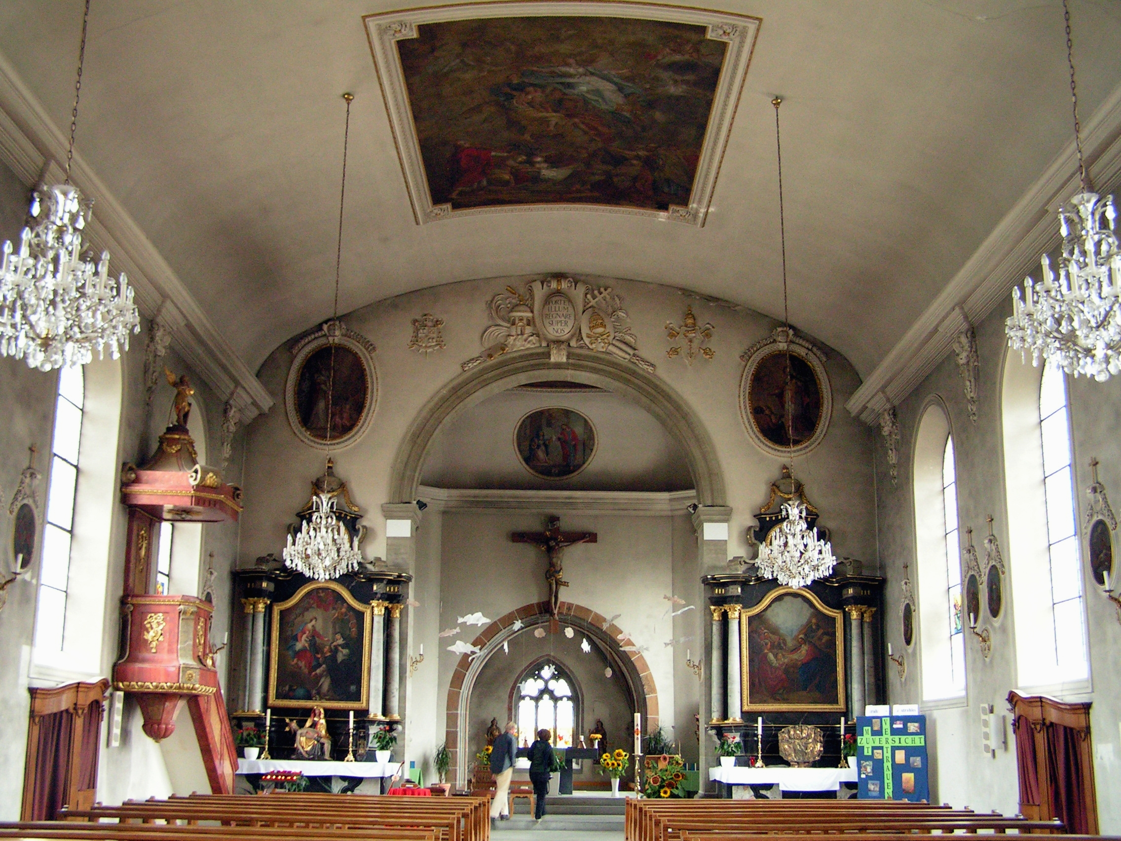 Kirchweg 3, Tafers. Intérieur de l'église Saint-Martin.